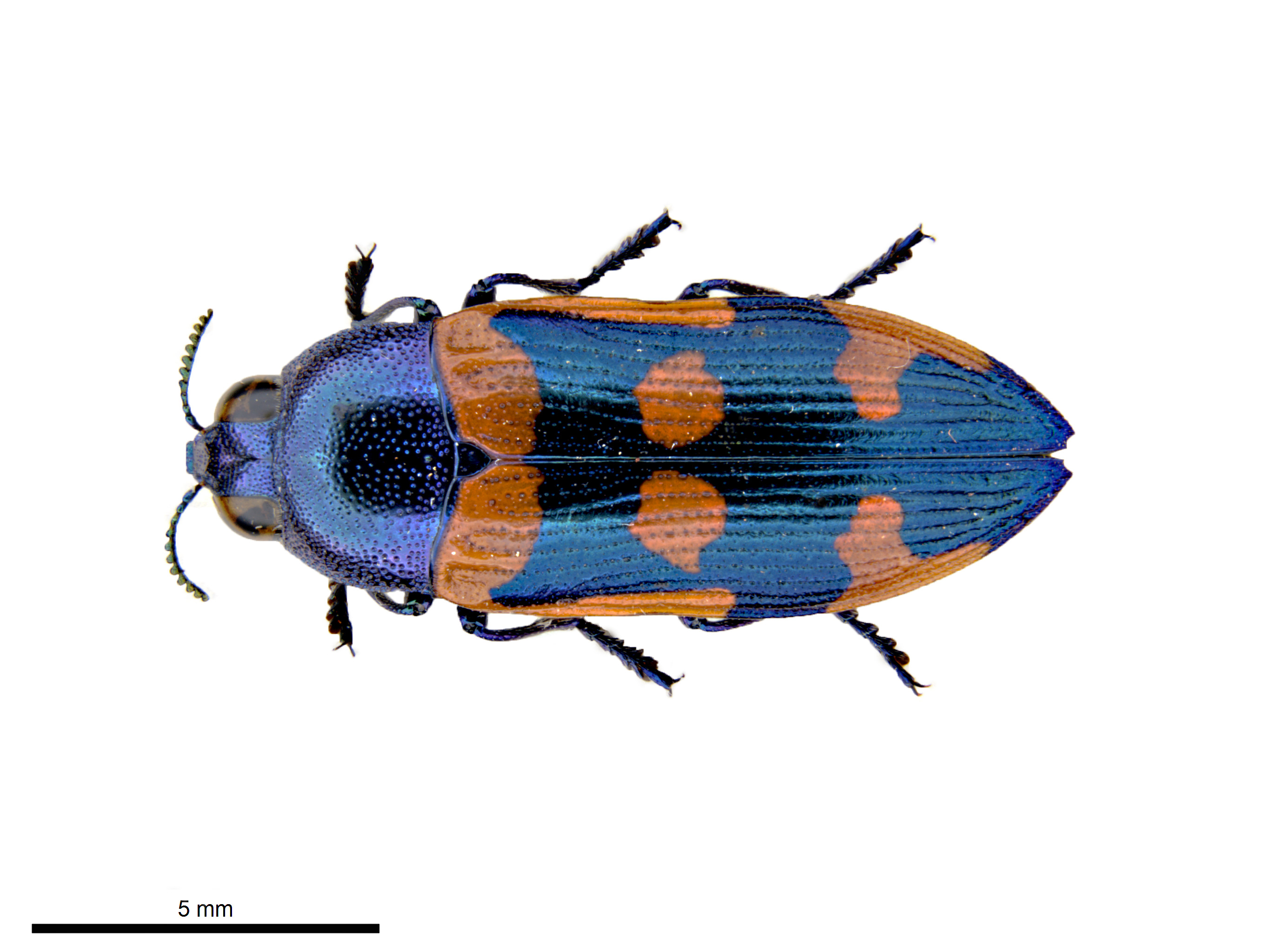 Castiarina jospilota